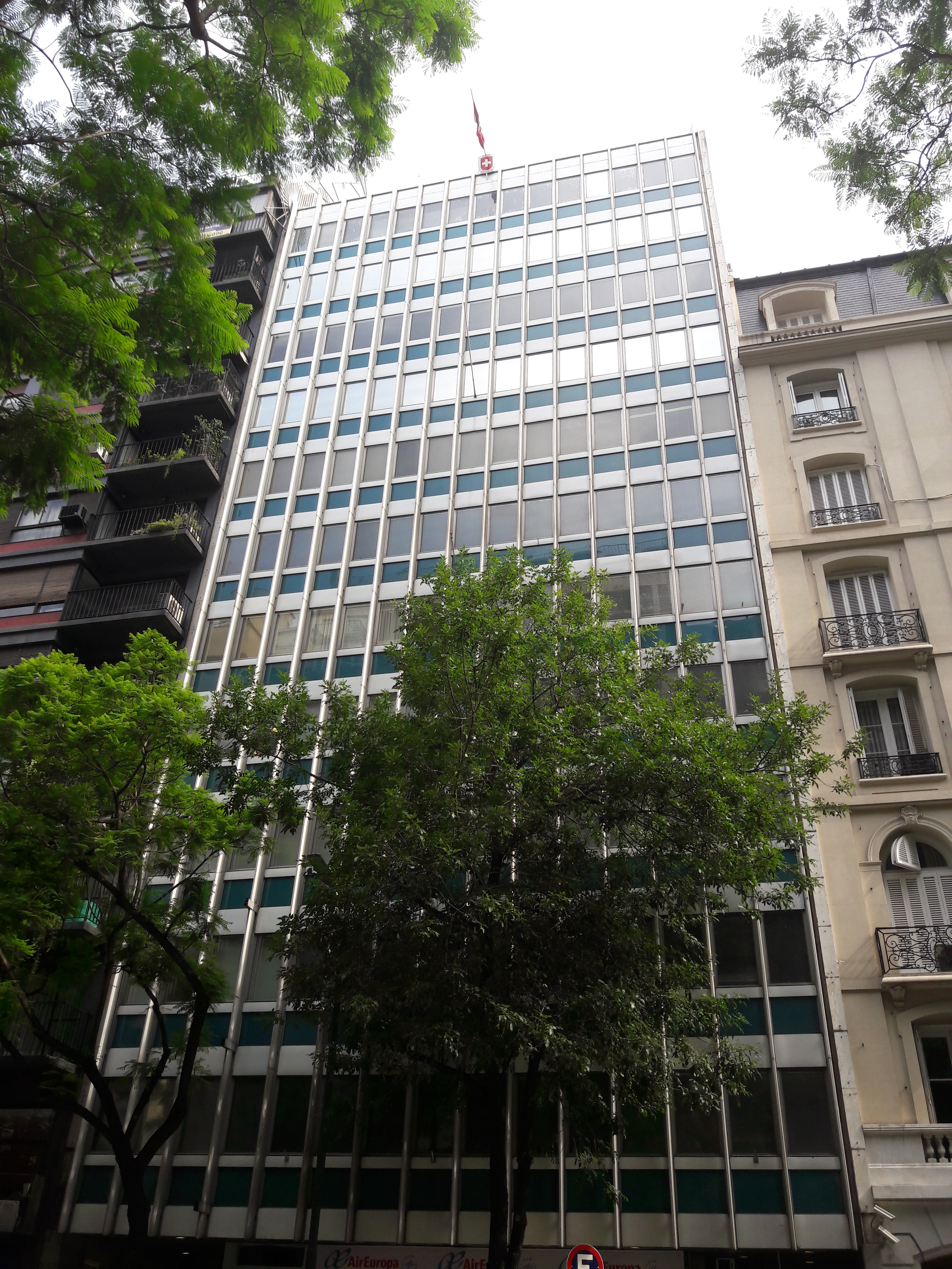 Embajada de Suiza, Retiro, Buenos Aires, Argentina.